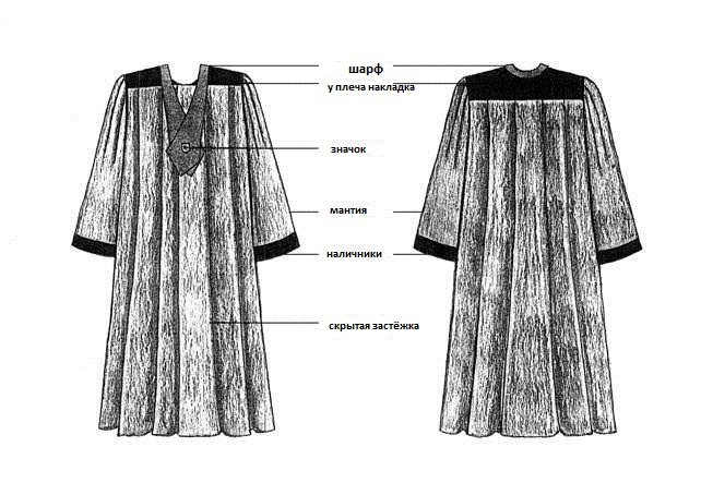 Мантия литовского прокурора